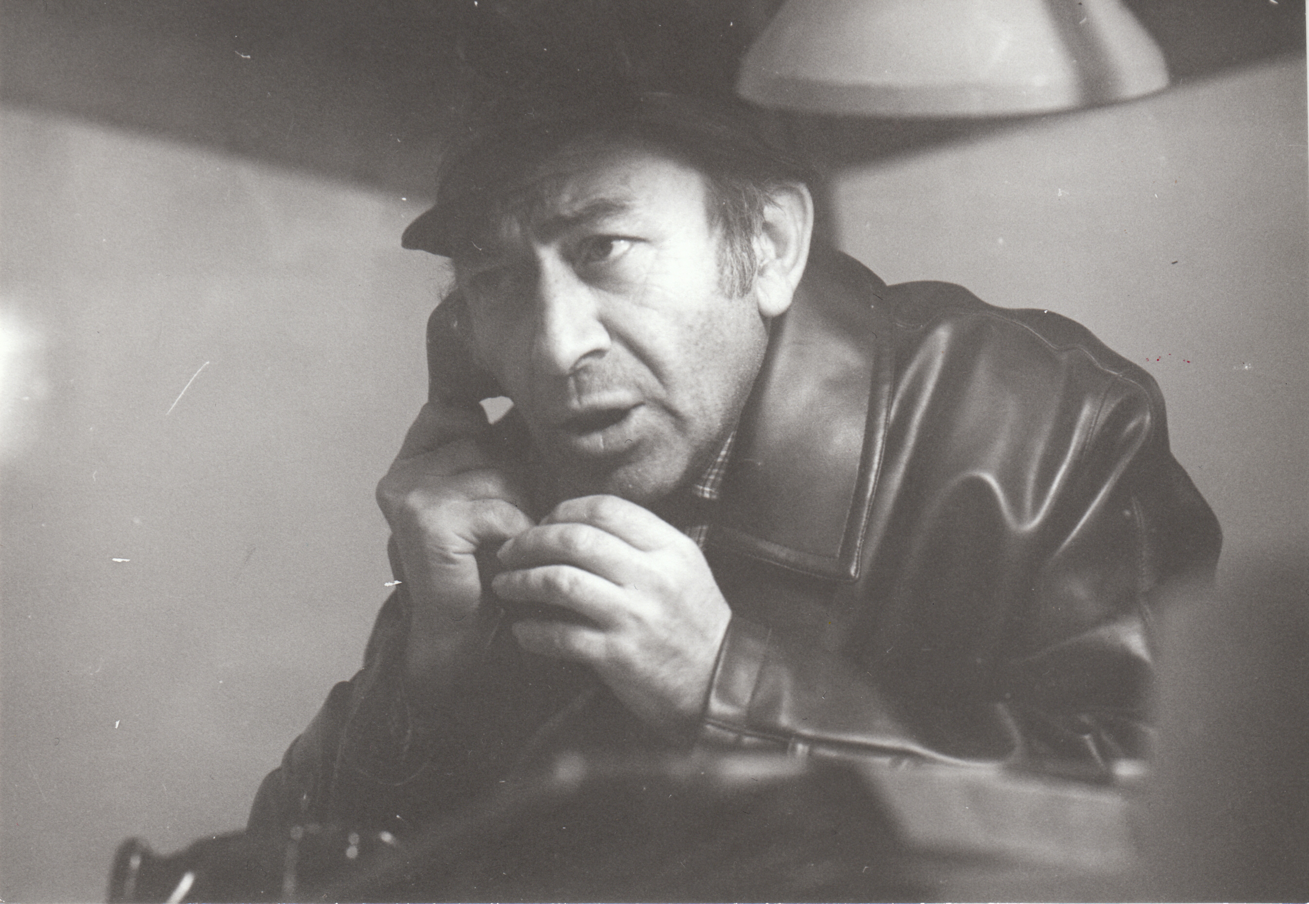 Филм „Масово чудо“ 1981, режисьор Иван Павлов Минко Минков в ролята на Доносника